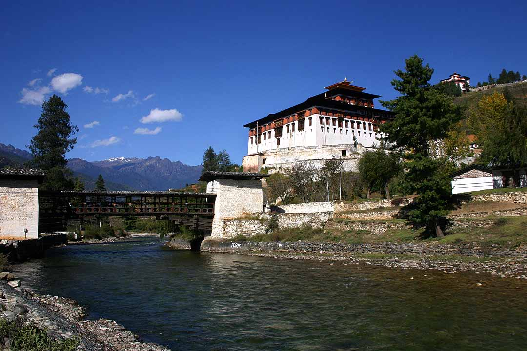 Dzong, Paro, BhutanBhutan